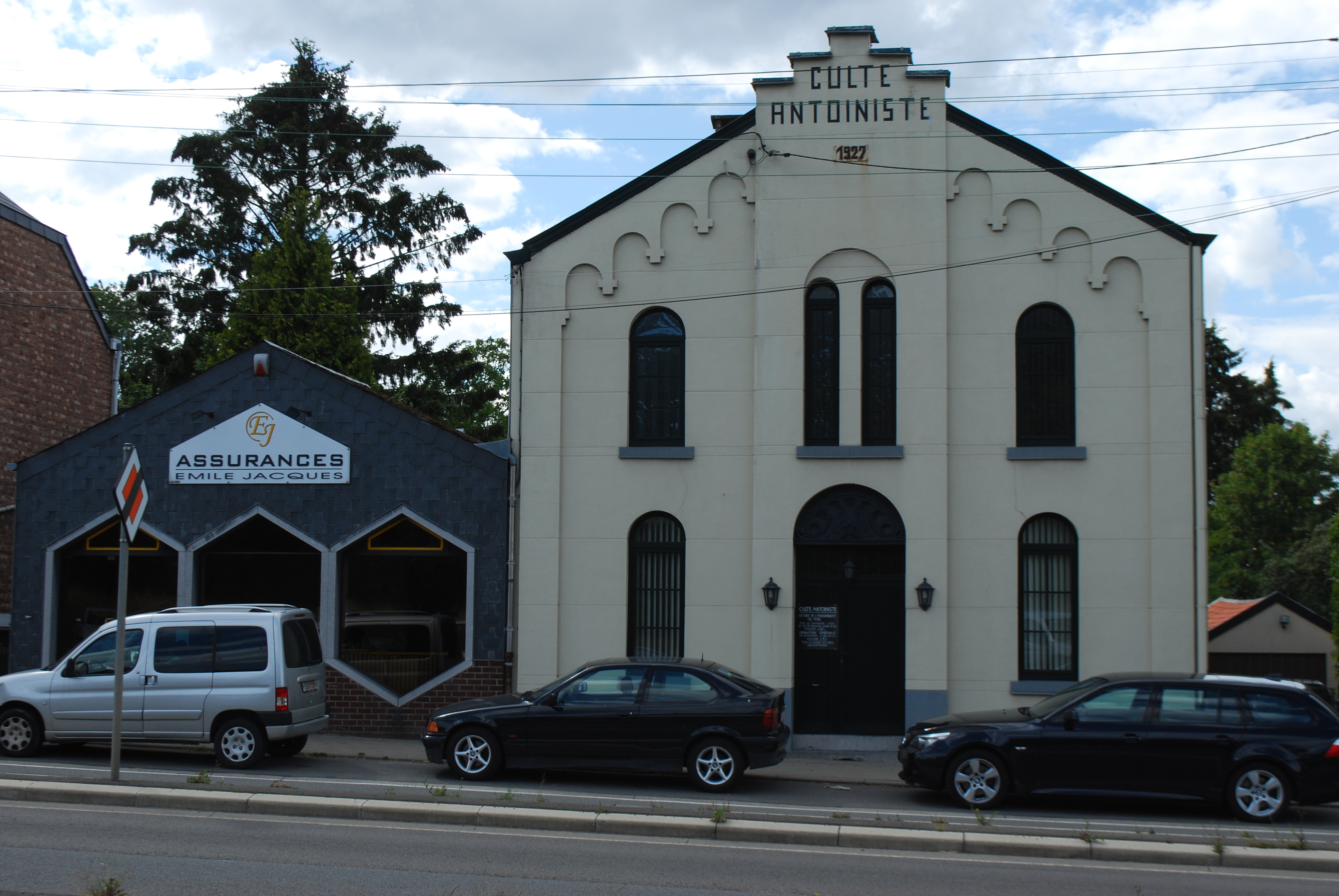 Eglise du culte antoiniste, à Nandrin.